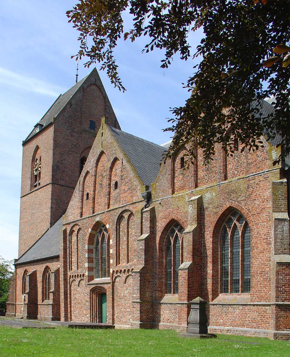 Petrus en Pauluskerk Loppersum